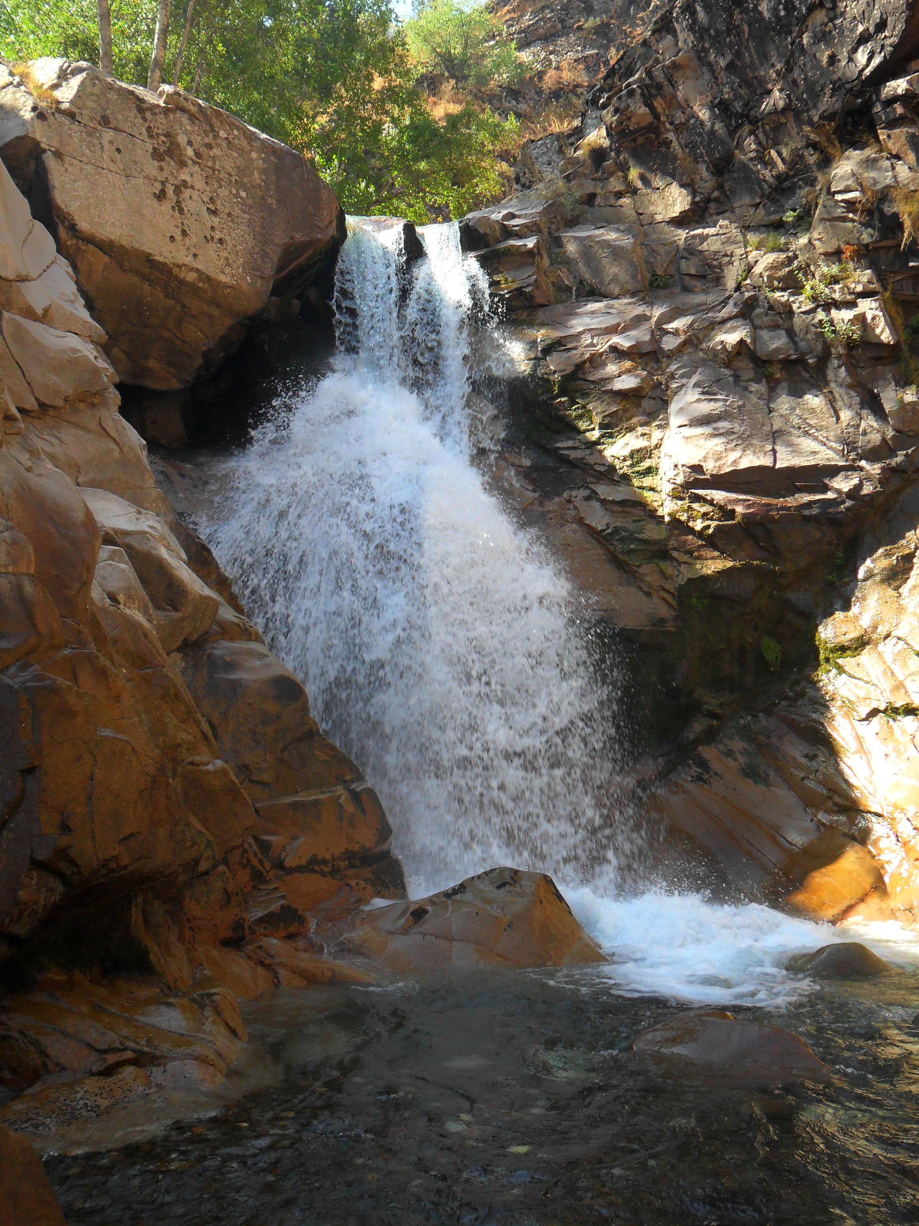 Водопад на реке Караарча. Бостанлыкский район, Ташкентская область, Республика Узбекистан